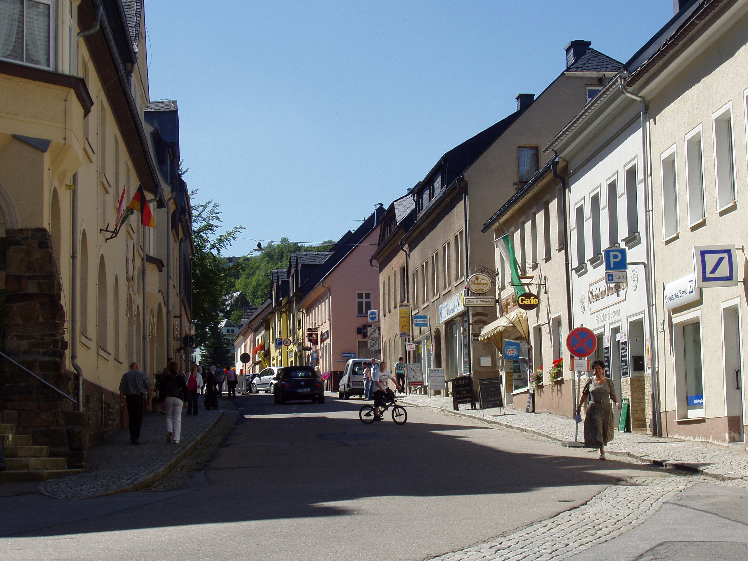 Maxmilián Fotografie, Oberwiesenthal, Erzgebirgskreis, Innenstadt